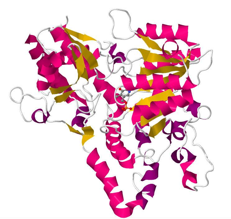 Kynureninase